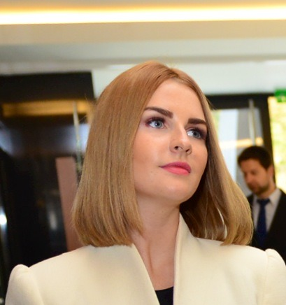 Kateřina Zemanová